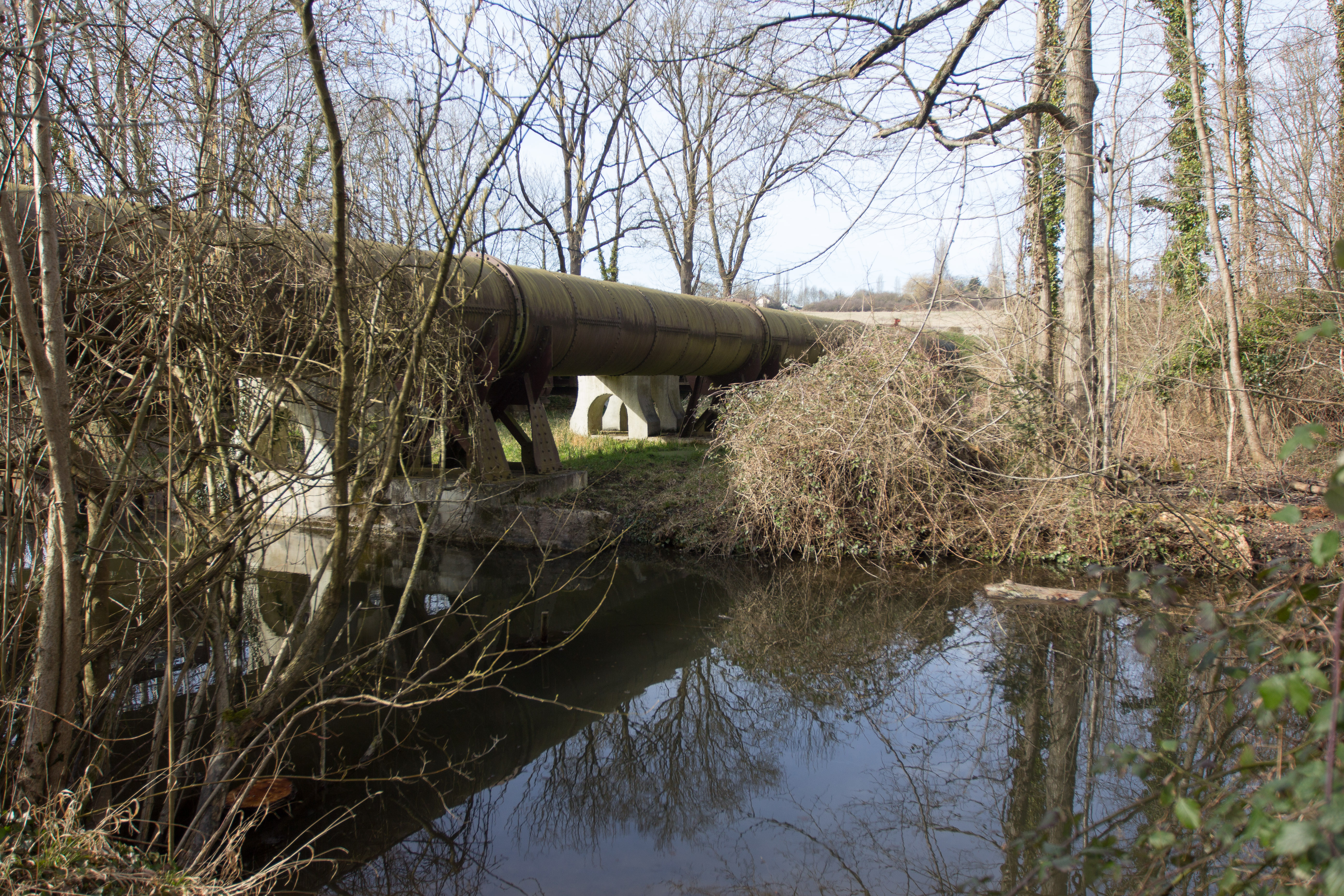 L'aqueduc de la Vanne à Villabé - Franchissement de l'Essonne / Villabé / Essonne / France